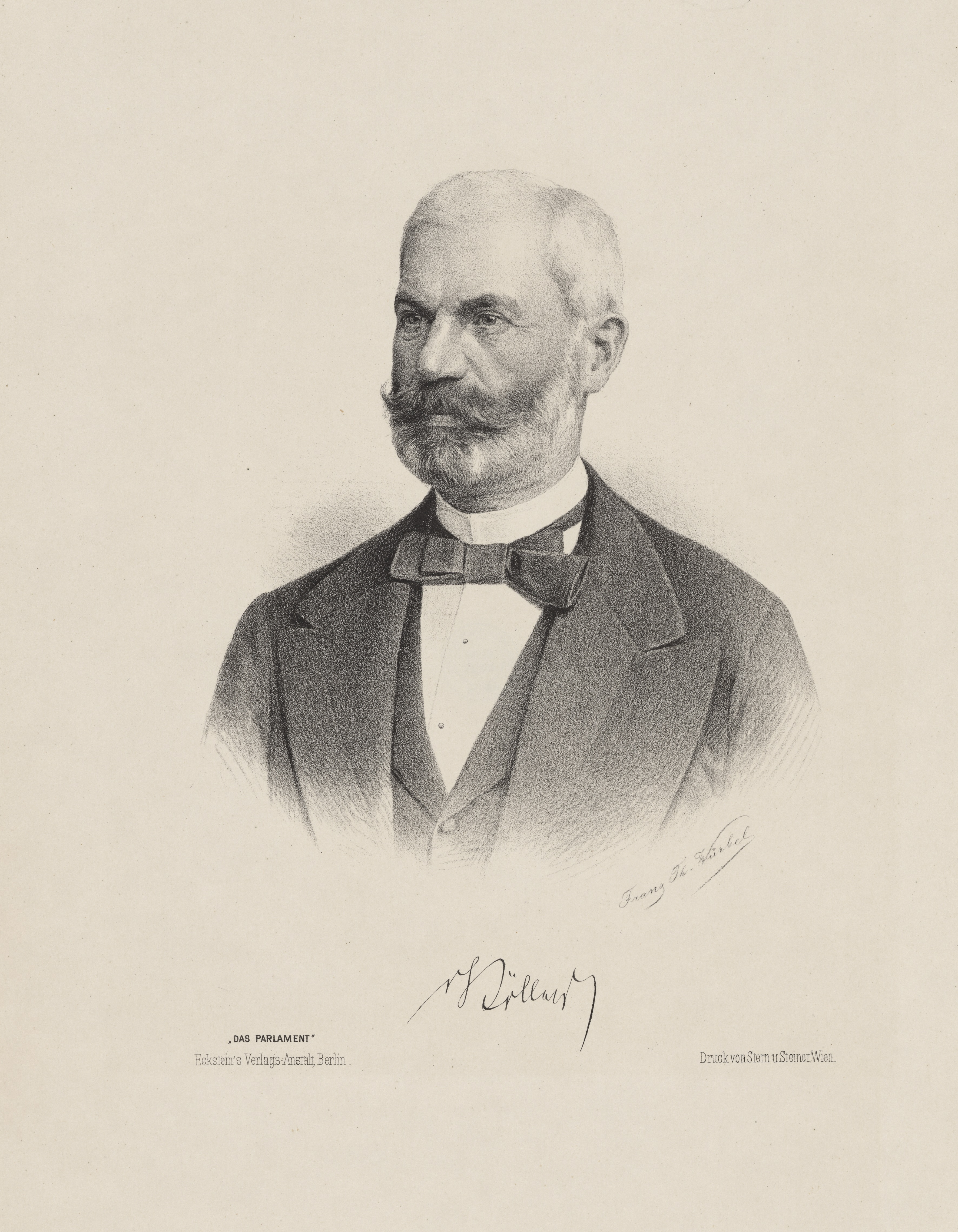 Porträtfotografie von Georg von Köller